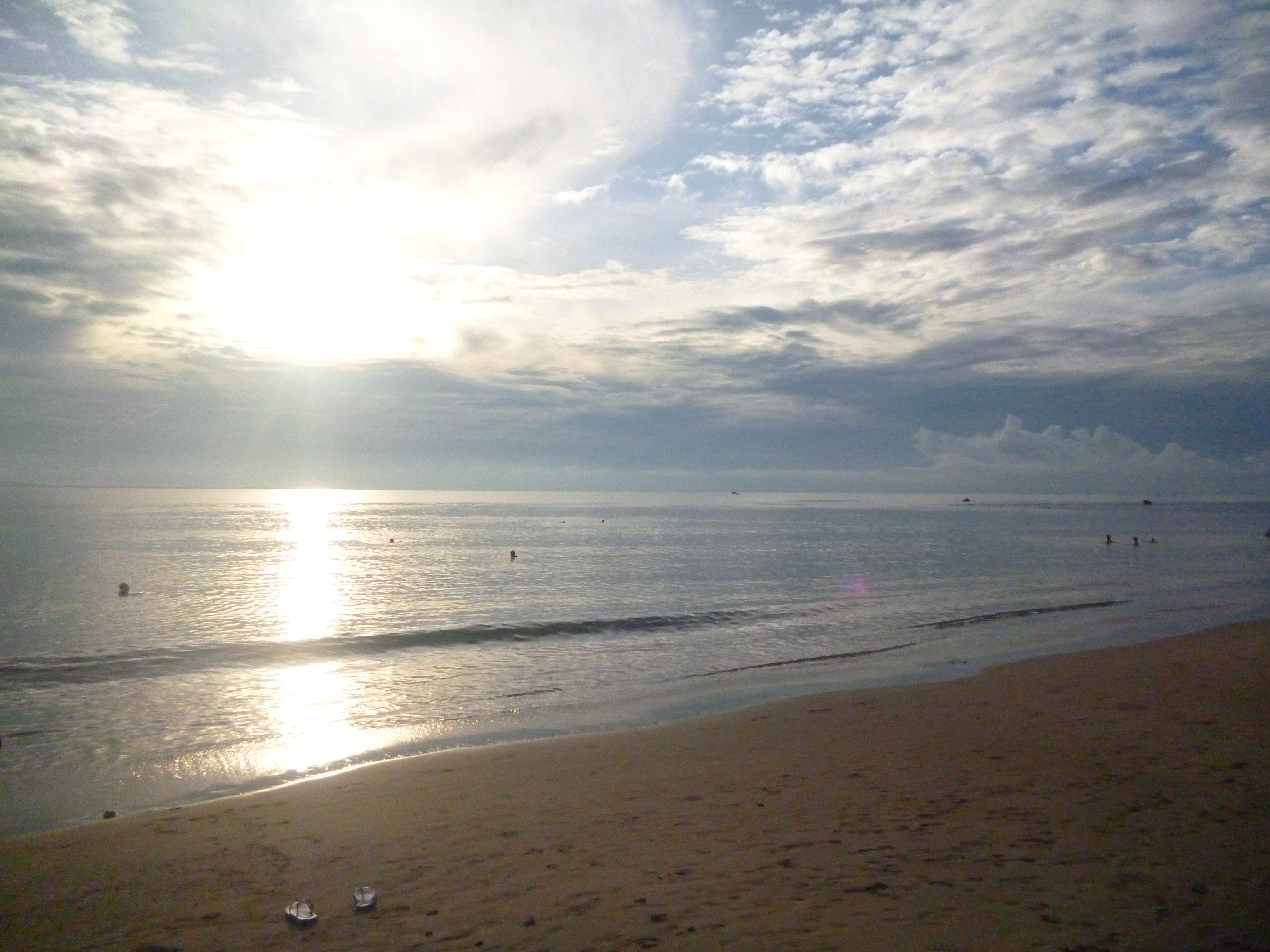 Bãi biển Ninh Chữ. Hình chụp sáng ngày 11.9.2013 tại Khu nghỉ dưỡng Sơn Long Thuận (Long Thuận Resort), Ninh Thuận, tự chụp bằng máy ảnh cá nhân.